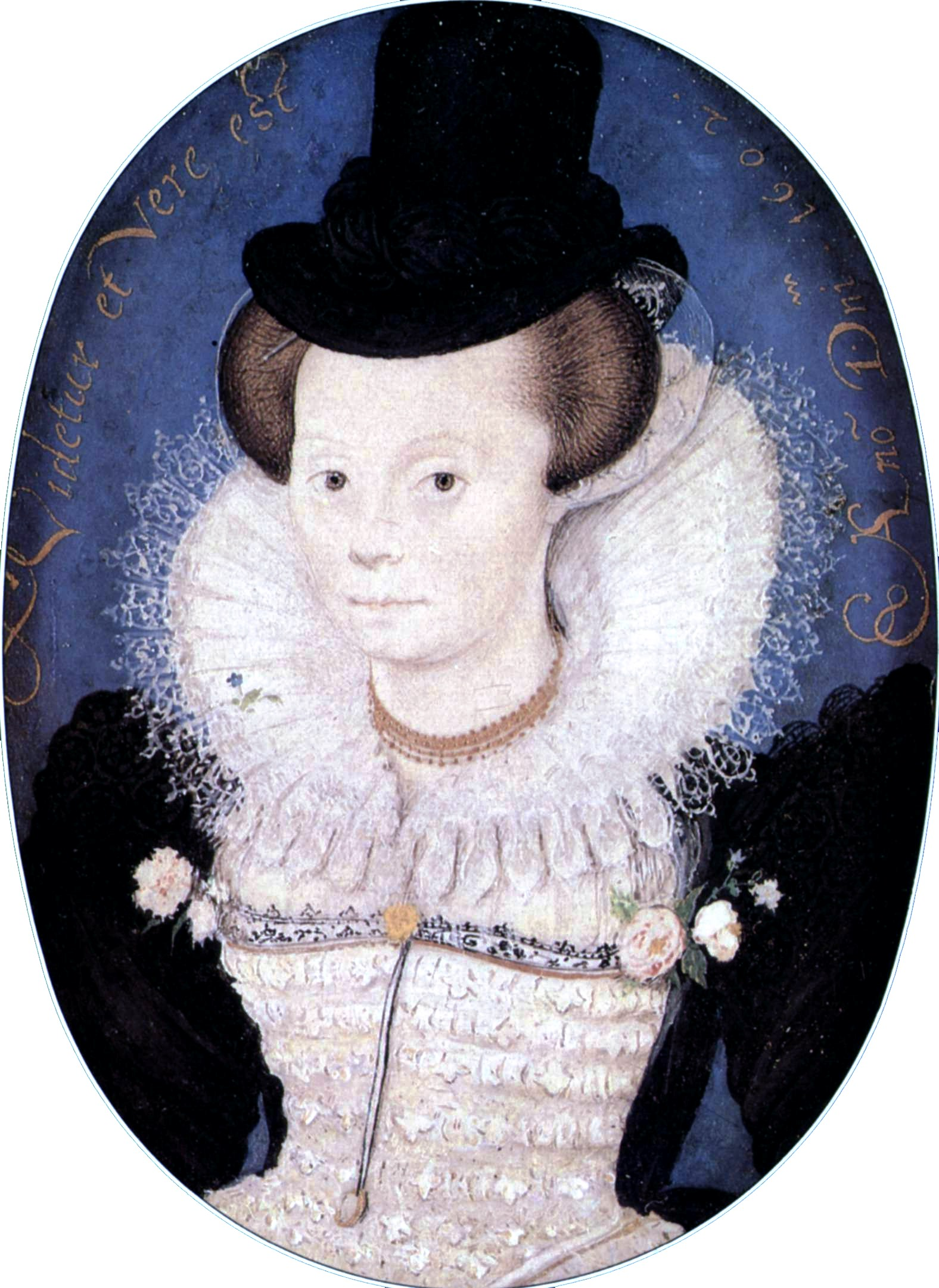 Miniaturmalerei, Elisabethanischer Stil